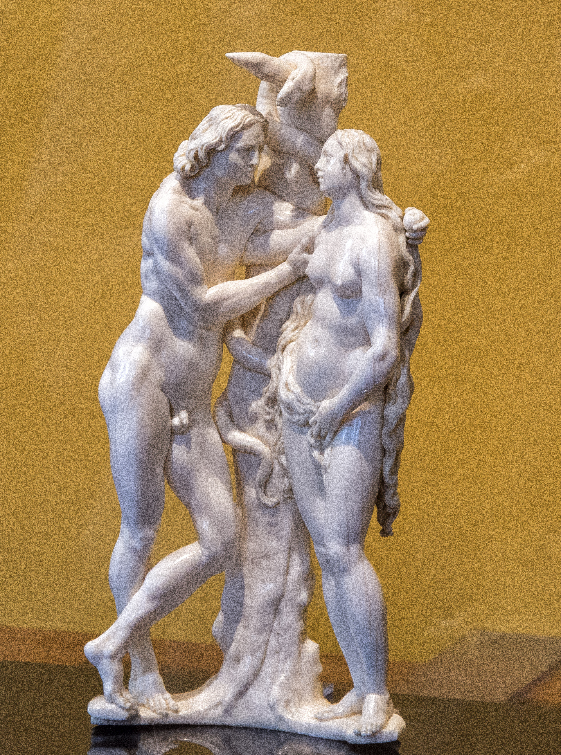 Georg Petel (1601of2-1635) - Adam en Eva - Rubenshuis Antwerpen